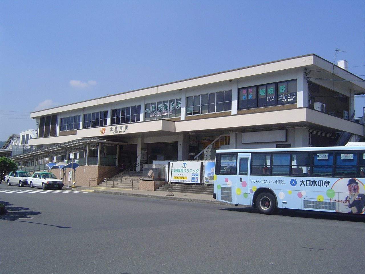 東海旅客鉄道（JR東海）中央本線土岐市駅